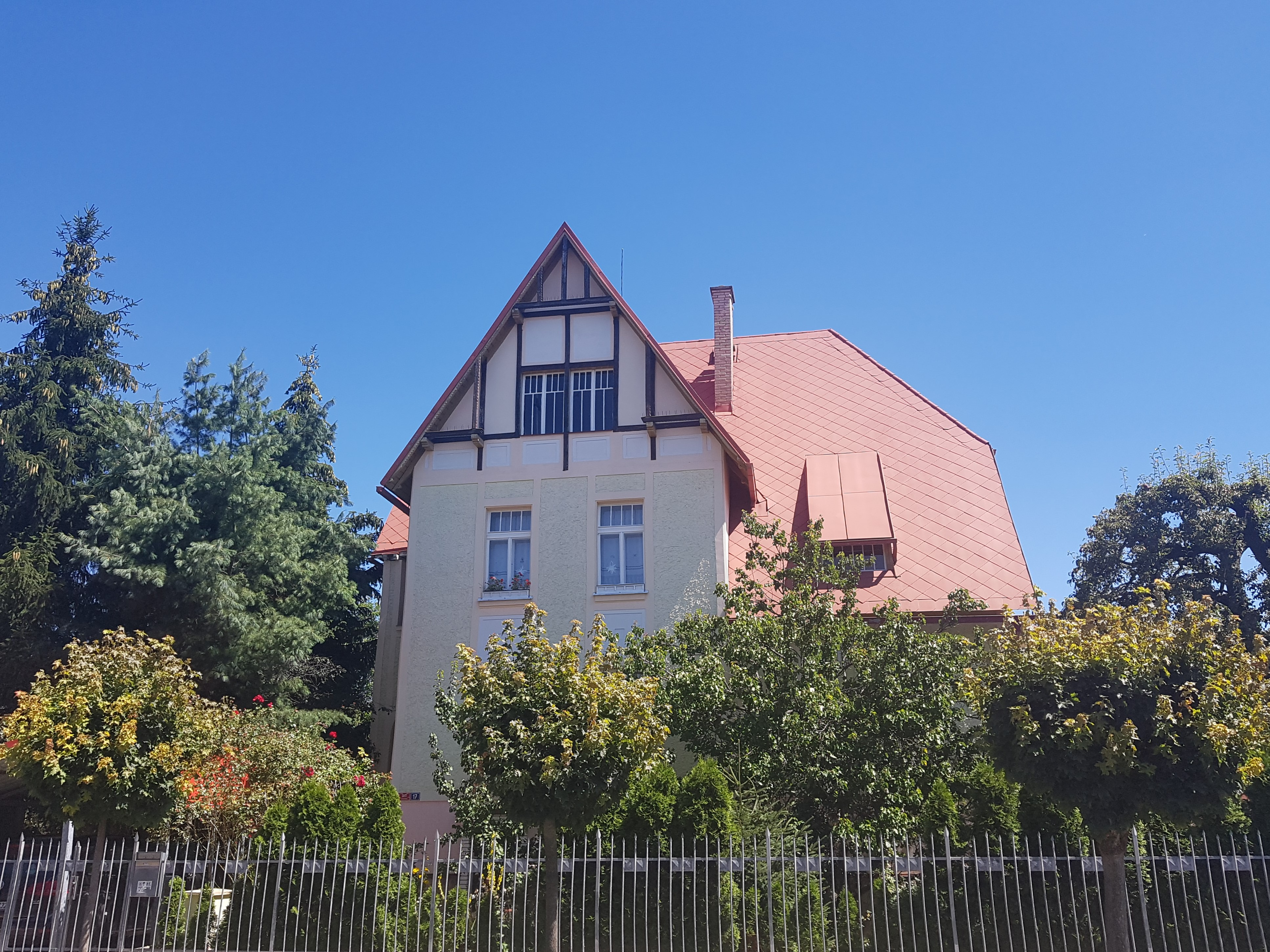 Vila Antonína Holečka v Hradci Králové (2020)